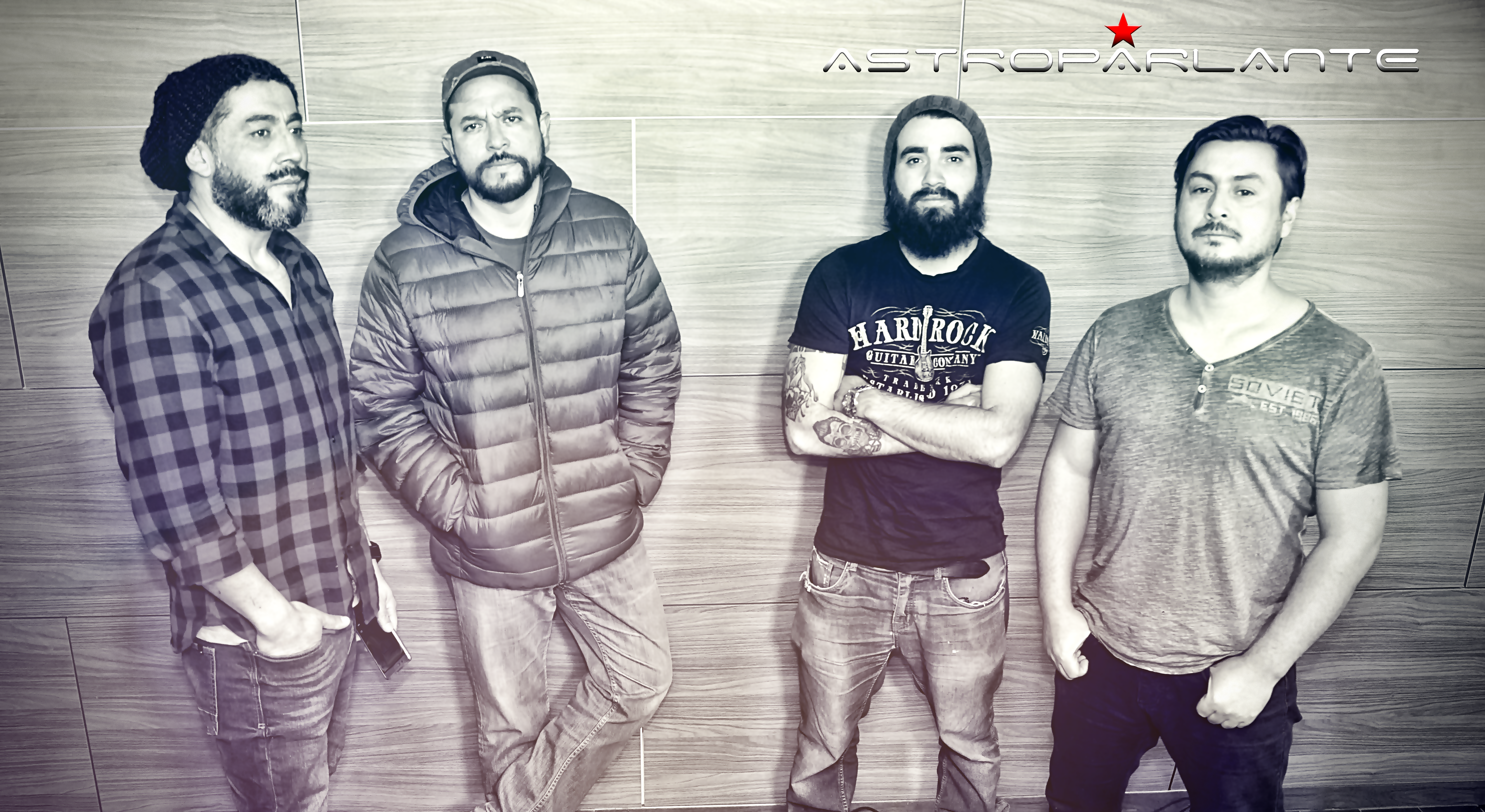 Astroparlante